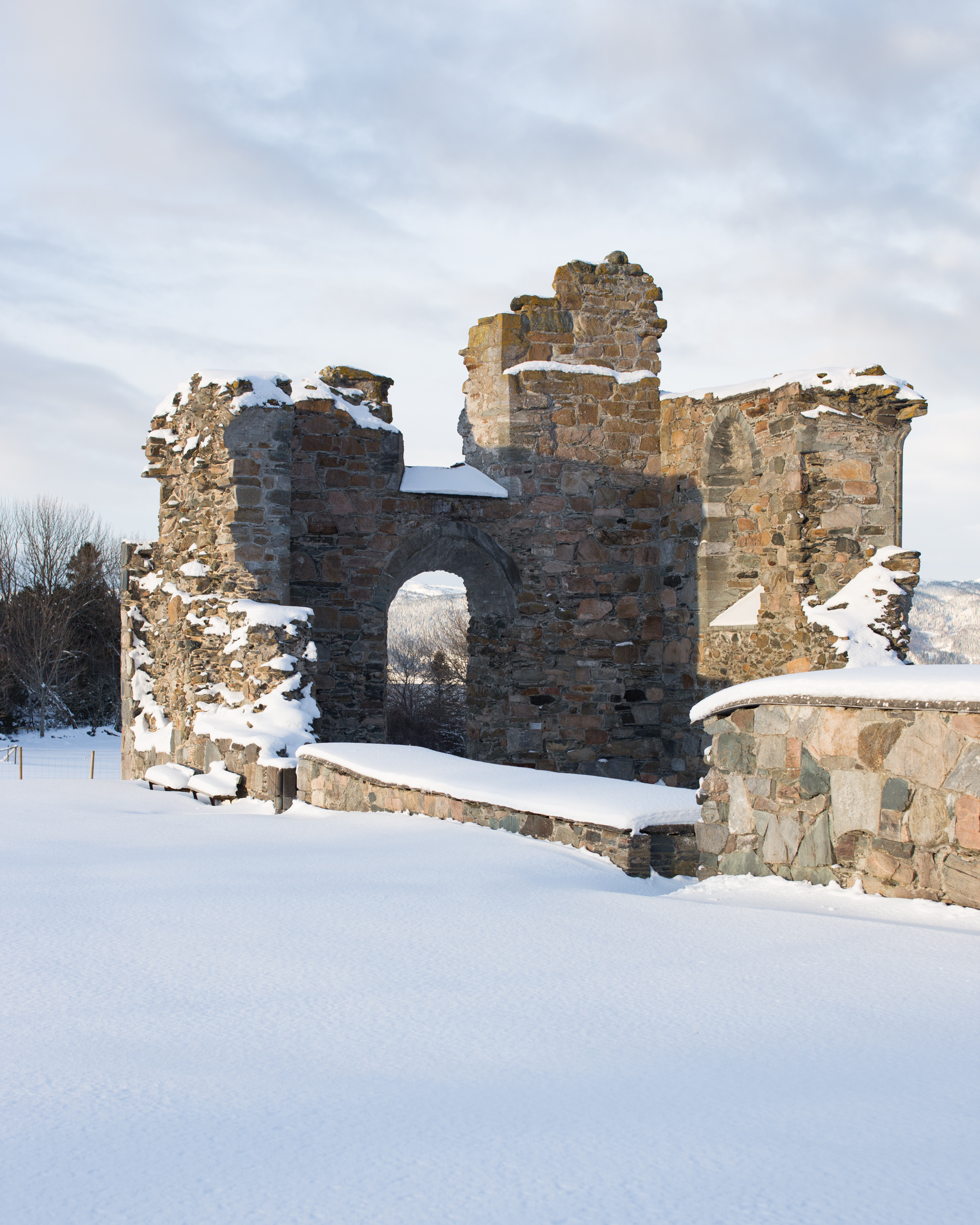 Vinterbilde av ruinen etter Tautra kloster.